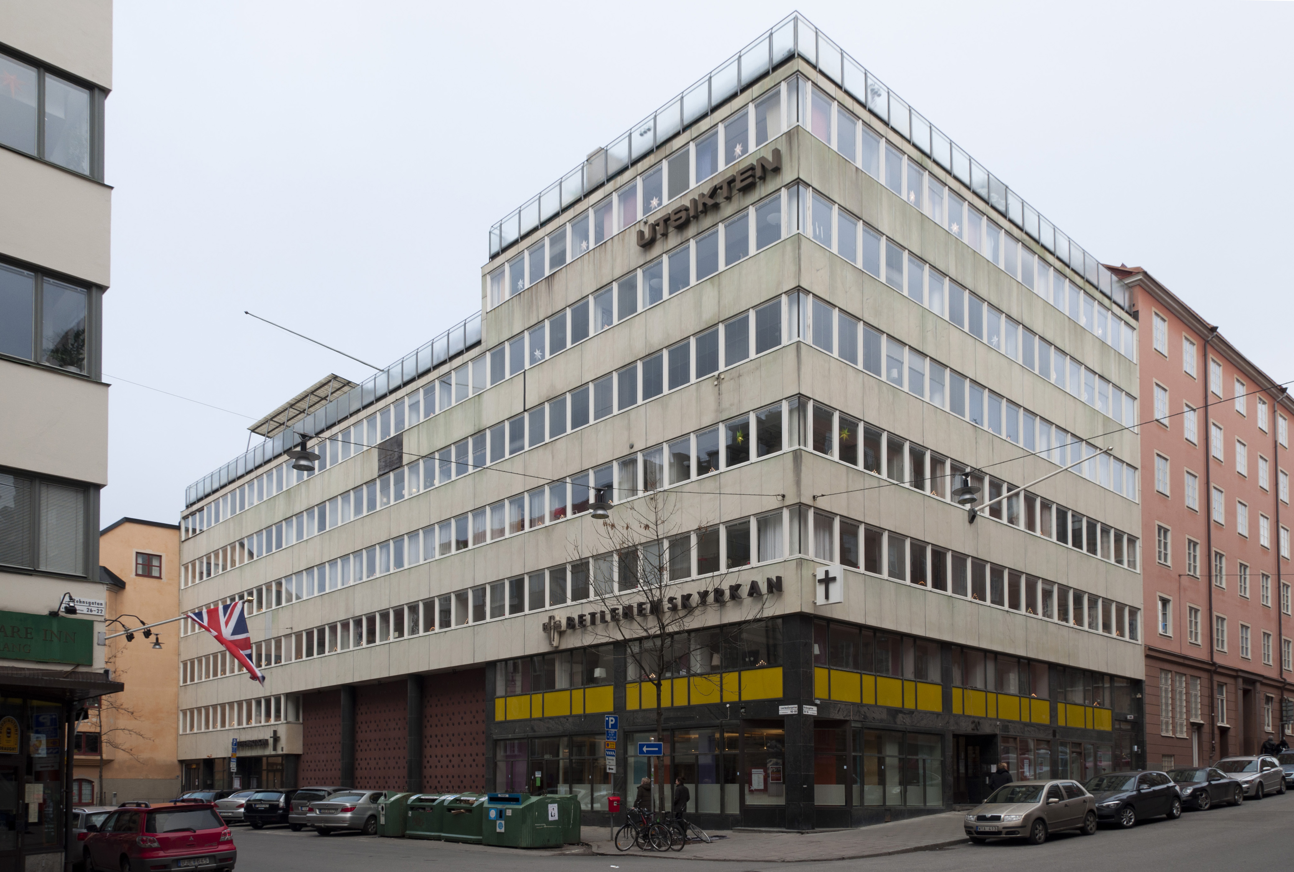 Betlehemskyrkan i kv Stolmakaren 14. Rehnsgatan 18-20, Luntmakargatan 80-84. Byggnadsår 1955-57, arkitekt Rolf Hagstrand, byggherre Evangeliska Fosterlandsstiftelsen, byggmästare N Bonnier.